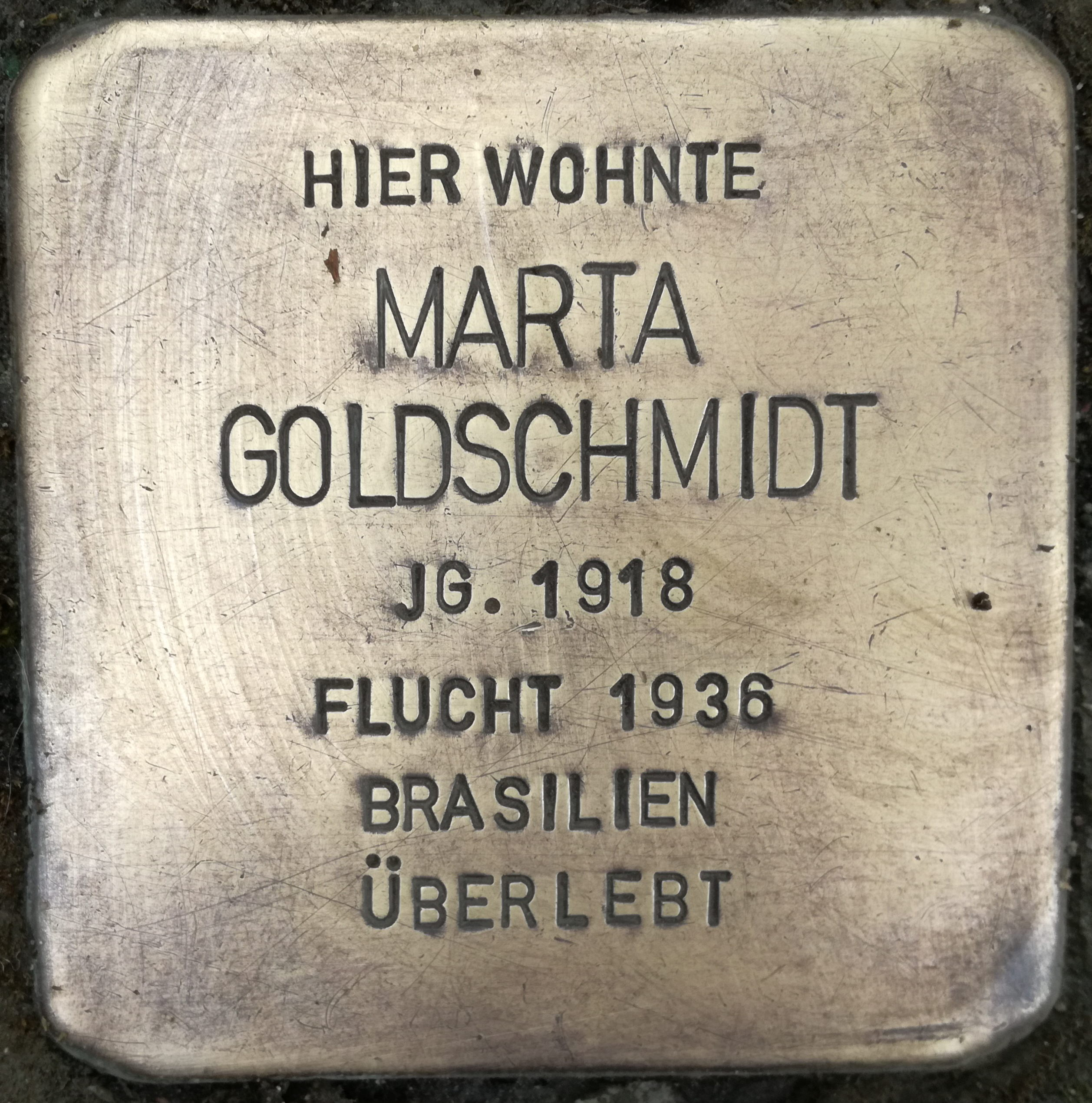 Hier wohnte Marta Goldschmidt Jahrgang 1918 Flucht 1936 Brasilien überlebt